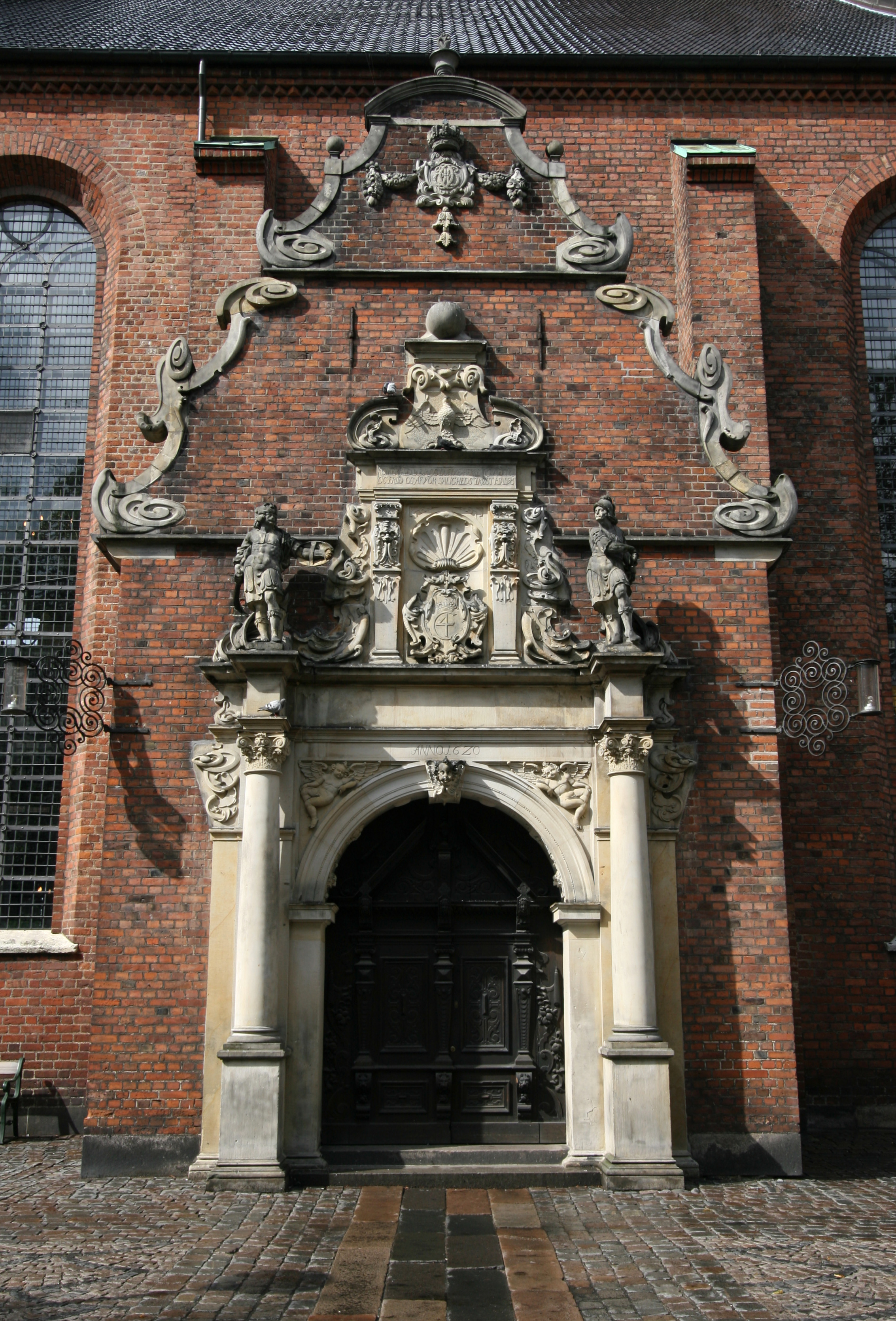 Helligåndskirken, Copenhagen, Denmark. Porch